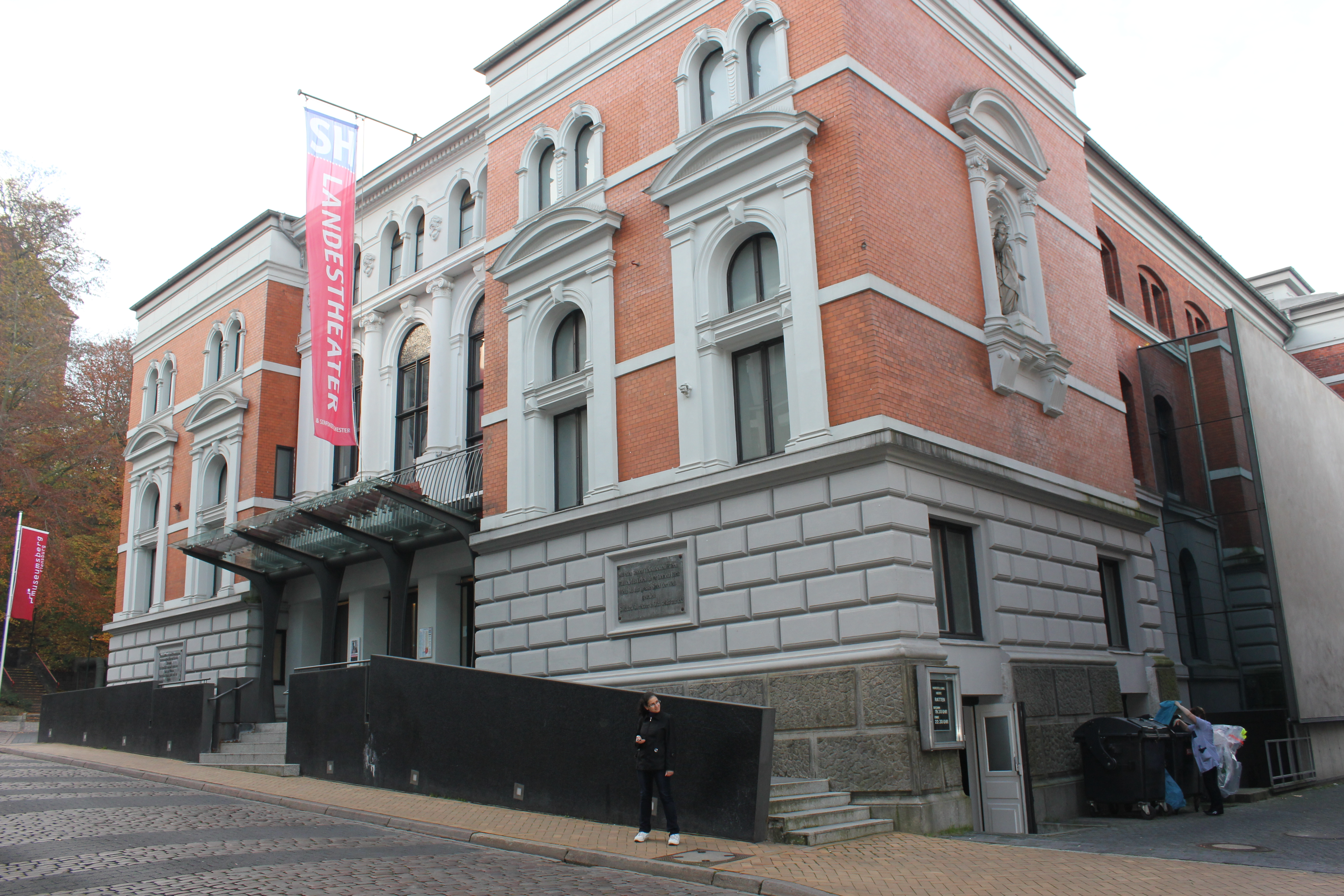 Landestheater Schleswig-Holstein (Flensburg) bzw. Stadttheater Flensburg